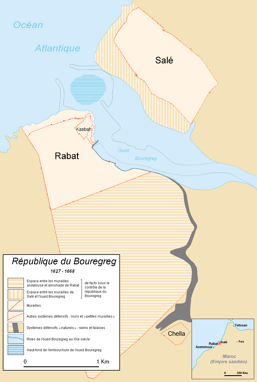 République du Bouregreg: Limites des médinas selon plans actuels de Rabat-Salé, terres asséchées approximativement selon مذكرات من التراث المغربي , photos datant du début du 20e siecle et illustrations du 17e siecle, limite de la Casbah avant l'extension alaouite selon le tracé actuel de l'ancienne muraille, tracé approximatif du canal relayant Bab Mrisa au Bouregreg, tracé approximatif de la petite muraille de Rabat donnant sur le Bouregreg et de Bab Elbhar.